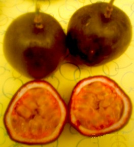 Passiflora edulis f edulis [1] - Fotografía tomada por Hhmb.